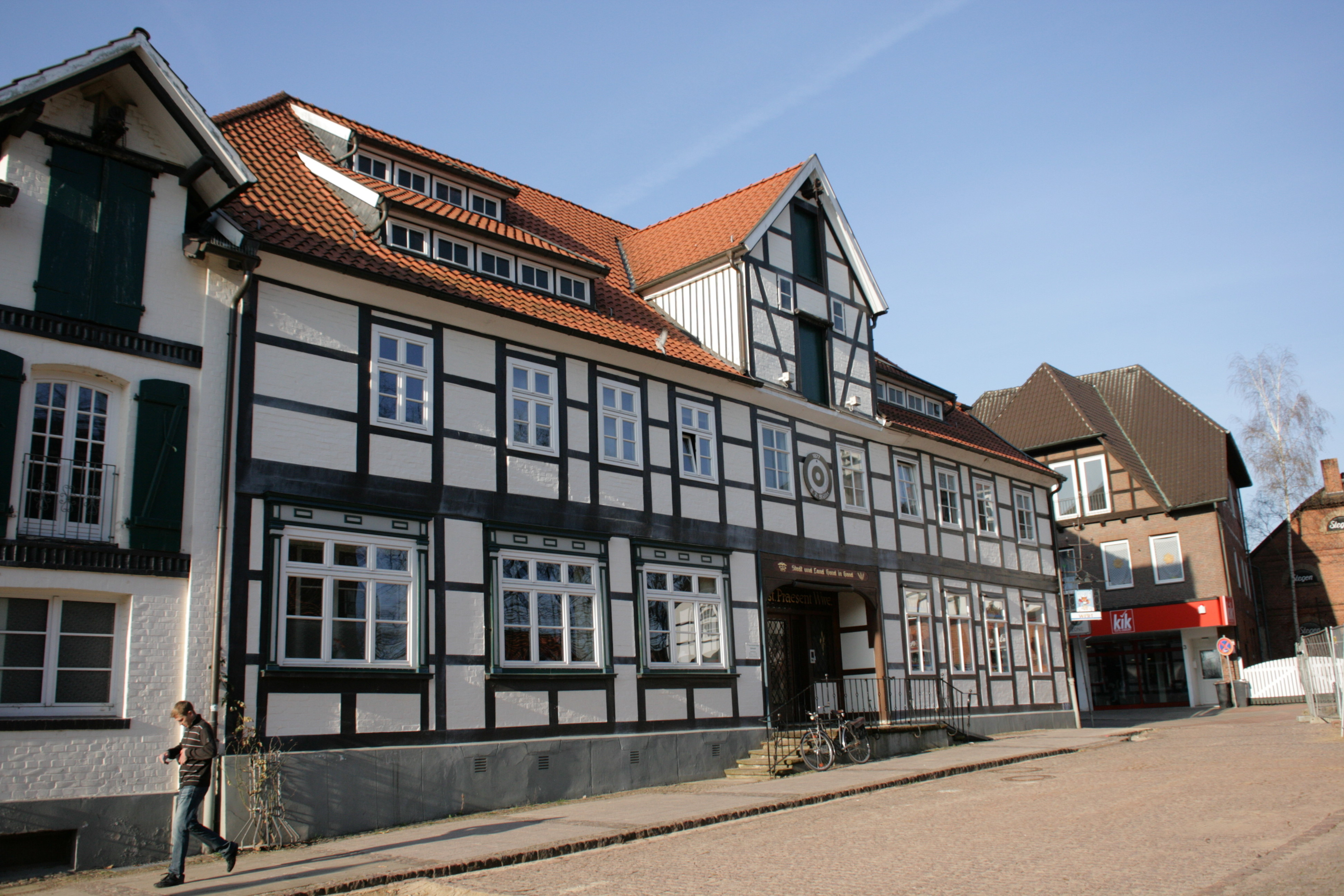 Brückenstraße in Bad Bevensen